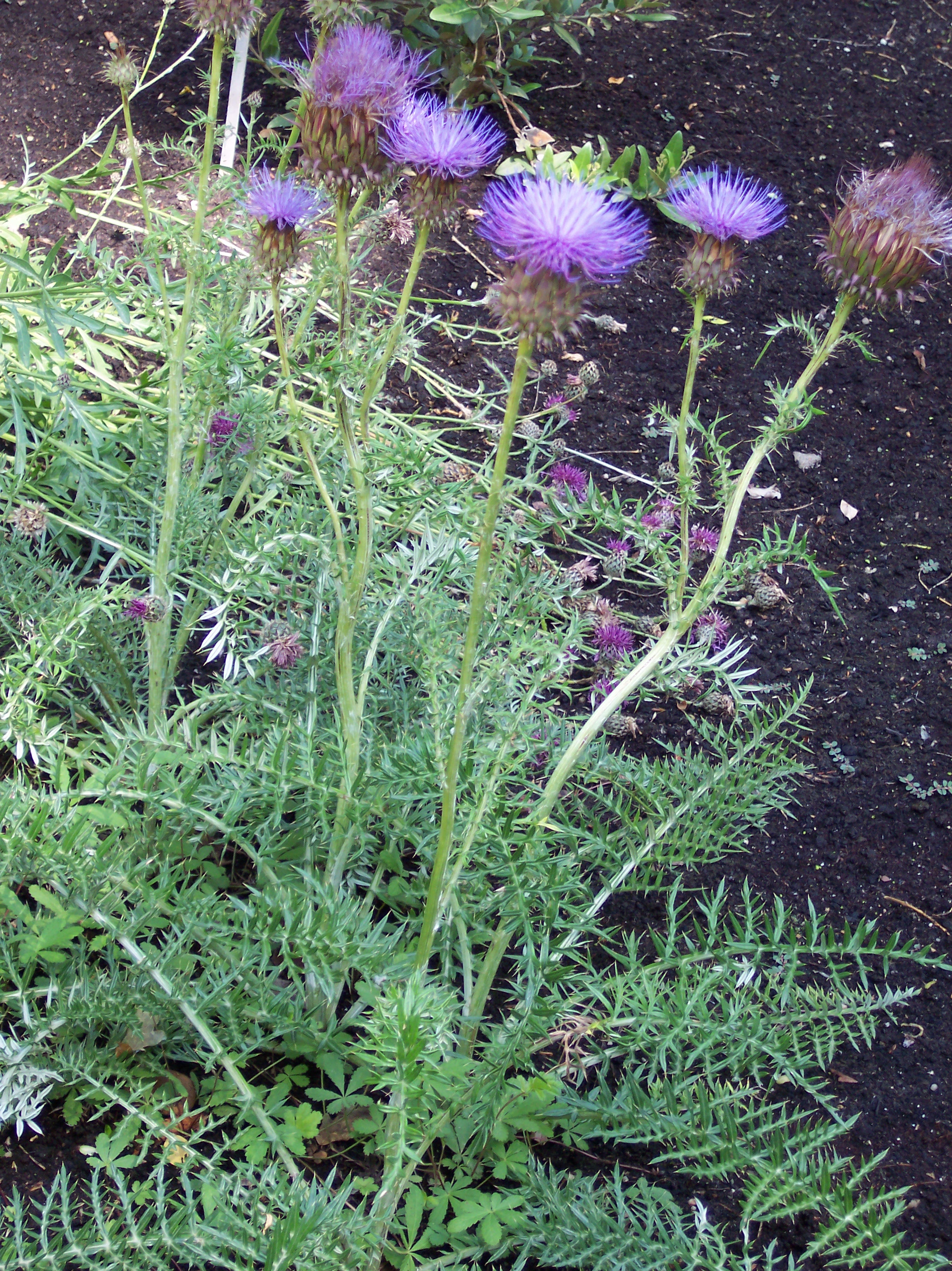 Cynara humilis. Real Jardín Botánico de Madrid